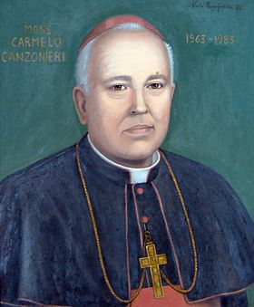 Vescovo cattolico in abito filettato e pellegrina.